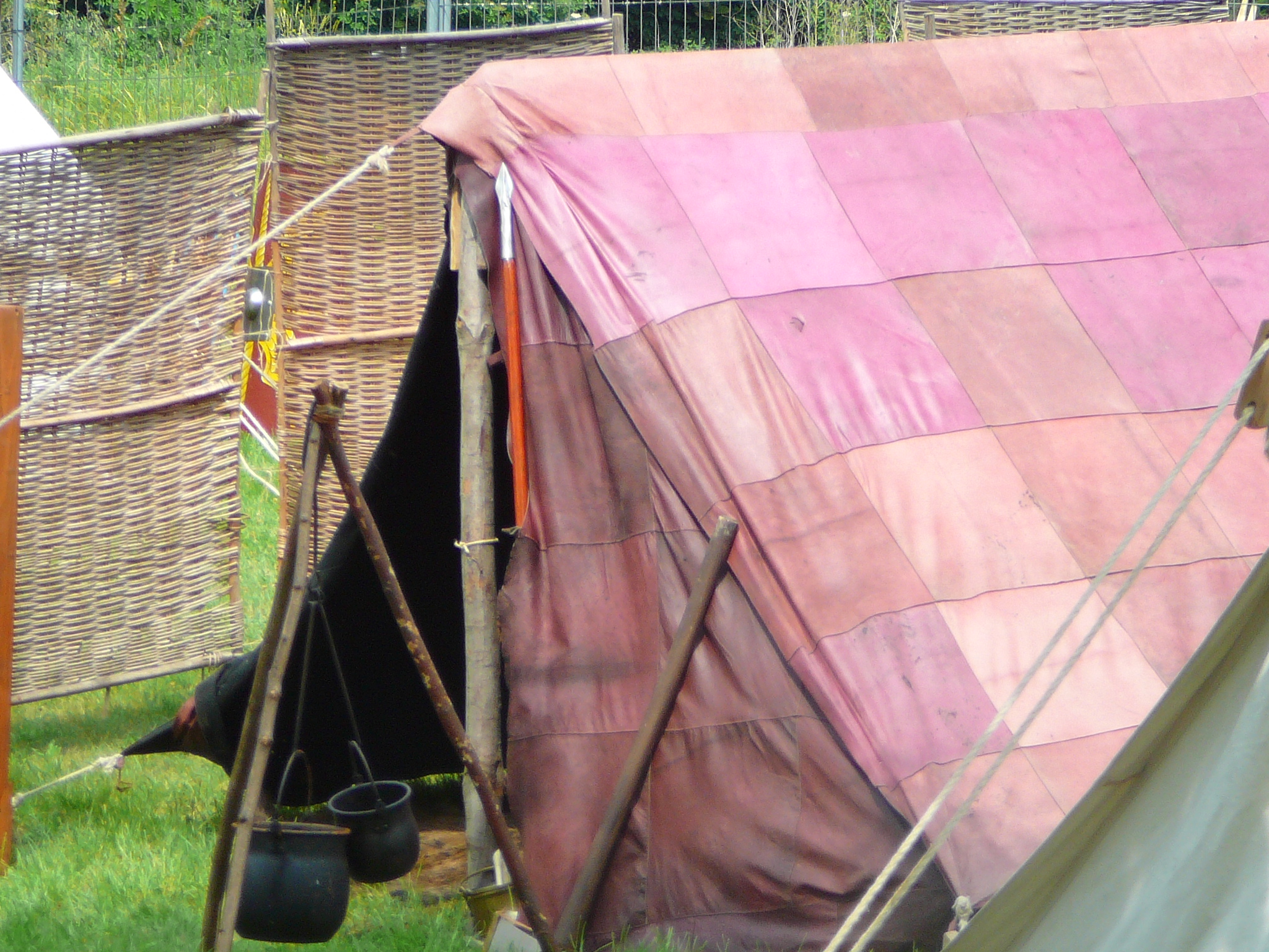 Zelt für 8 Legionäre aus Leder